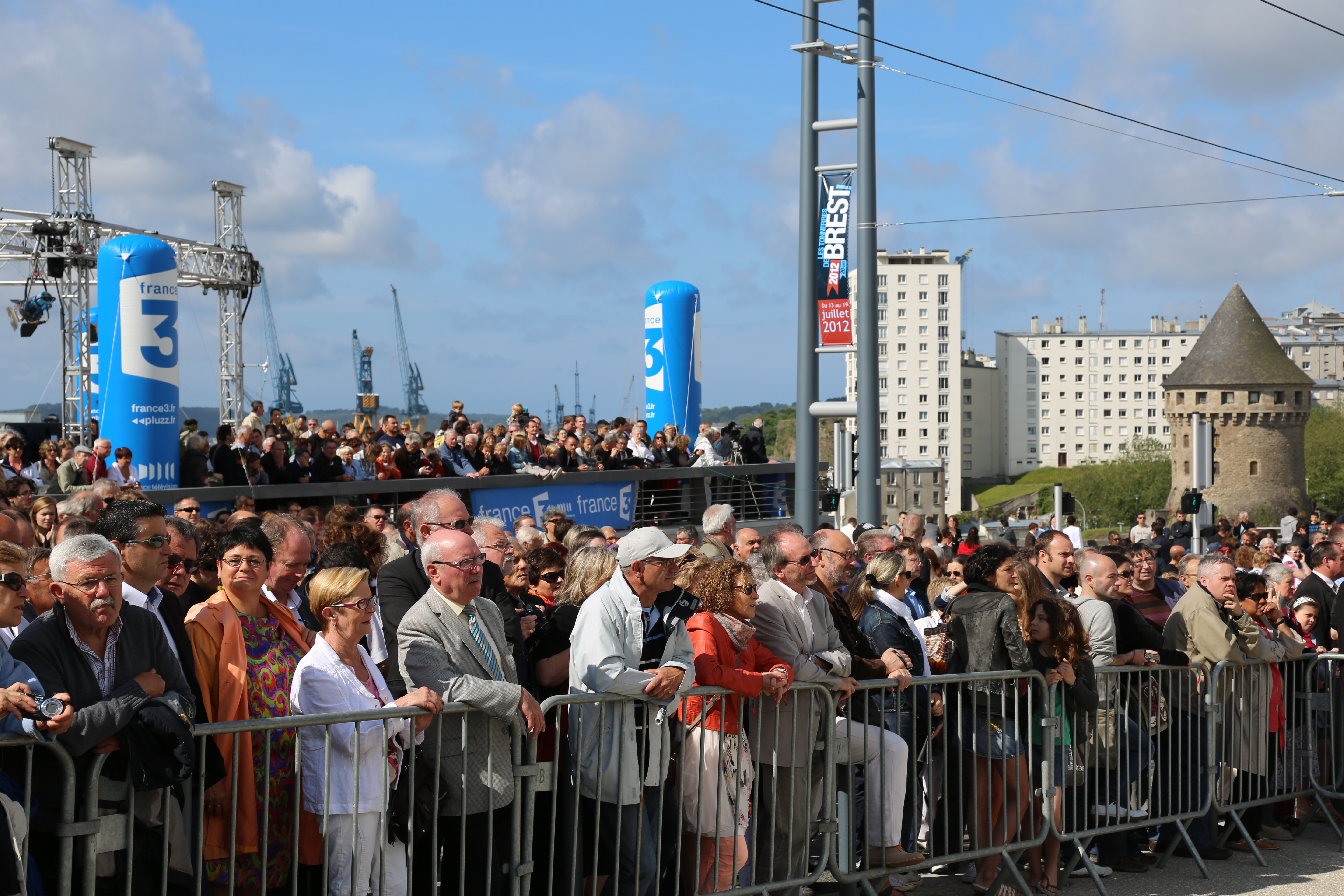 Photos autour de l'inauguration du Tramway à Brest le 23 juin 2012